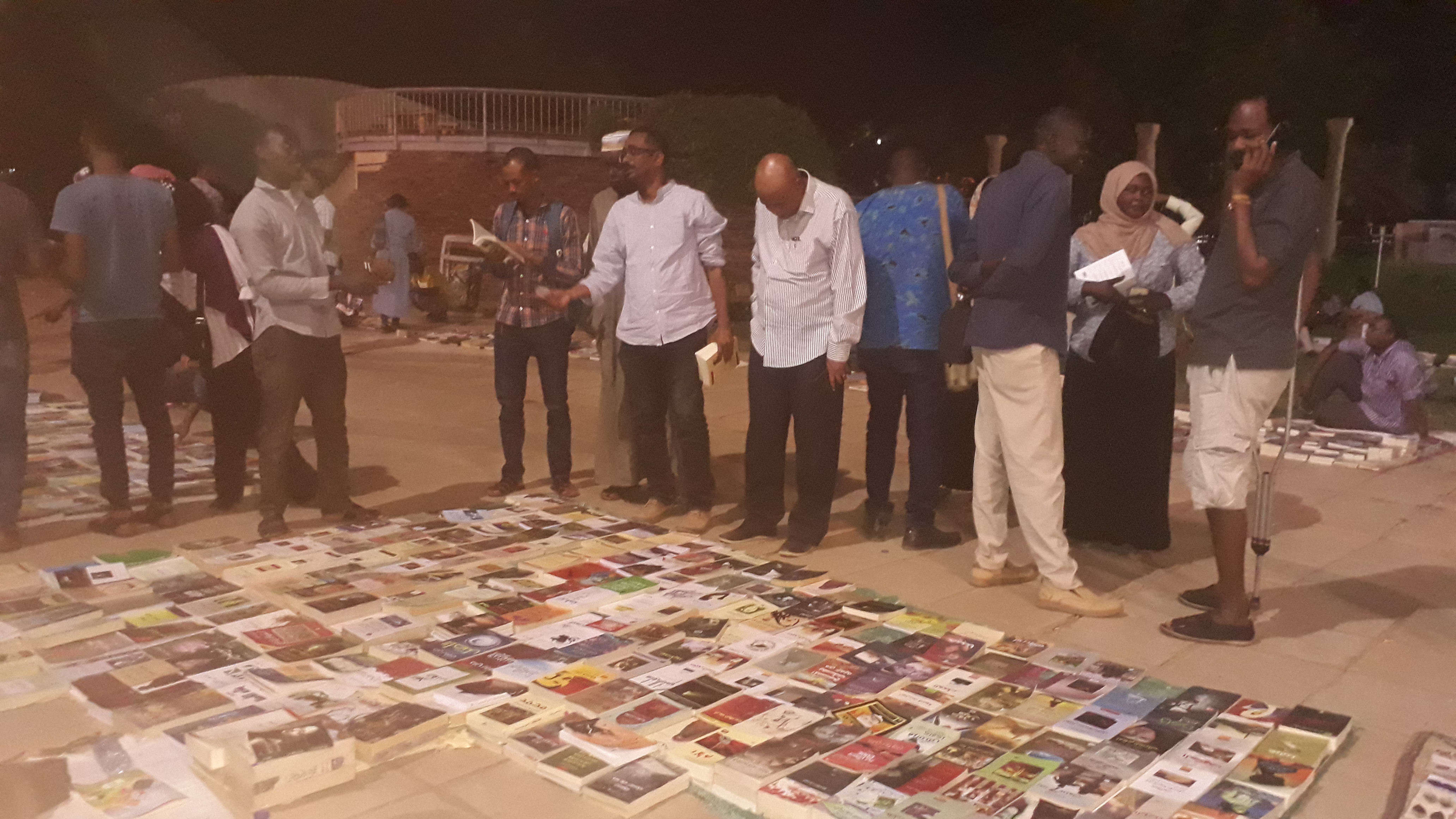 معرض للكتب المستعملة نظمته جماعة عمل الثقافية في شهر ديسمبر من العام 2019، في المتحف القومي السوداني